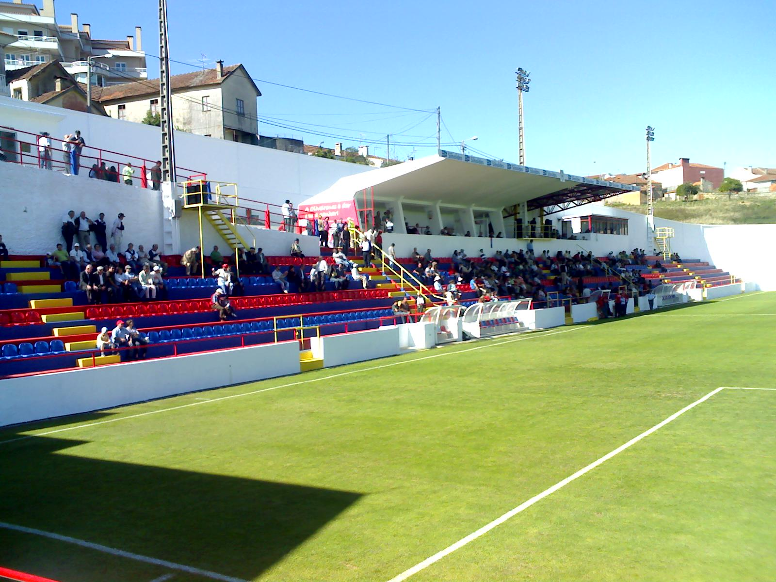 Estádio Carlos Osório, propriedade da União Desportiva Oliveirense, situado em Oliveira de Azeméis.